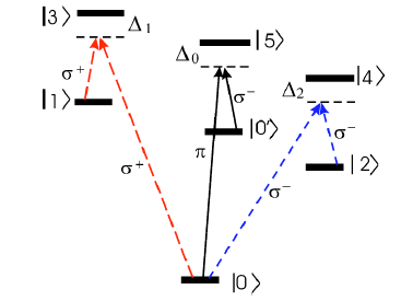 Son los niveles energéticos para un ión en una trampa lineal cuyas transiciones son debidas a la polarización del campo electromagnético